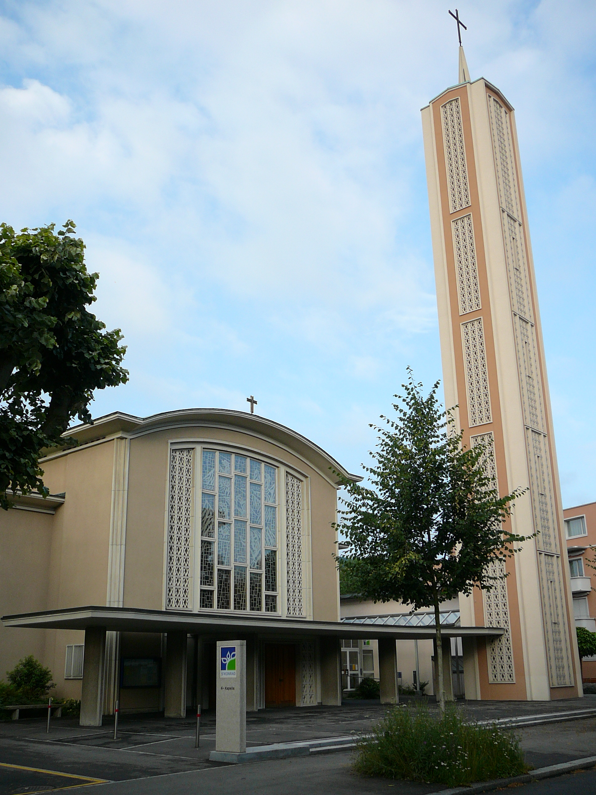 Römisch-katholische Kirche St. Konrad, Zürich-Albisrieden von der Fellenbergstrasse her